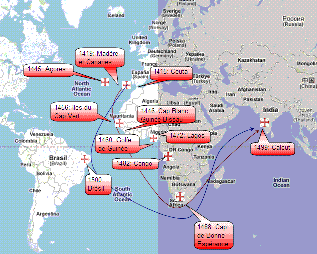 Découvertes et conquêtes territoriales, sous la banière de l'Ordre du Christ portugais